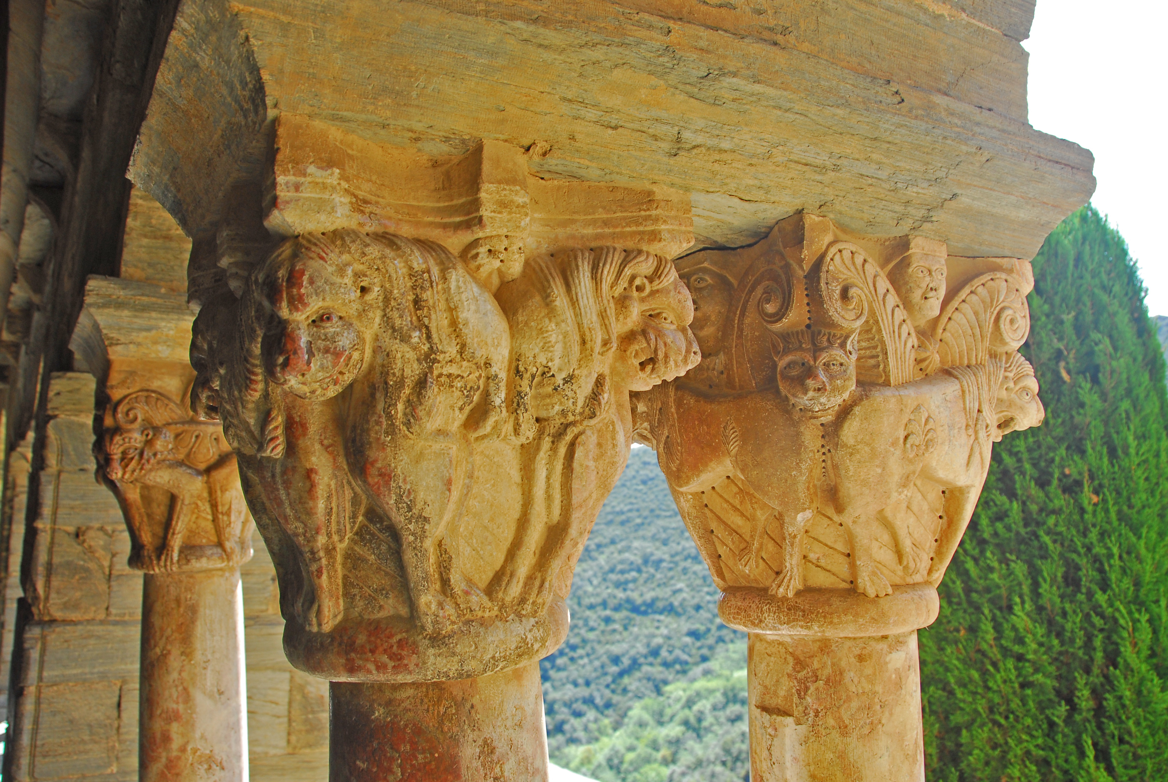 Serrabone, Kreuzgang, Kapitell Nr. 1+2